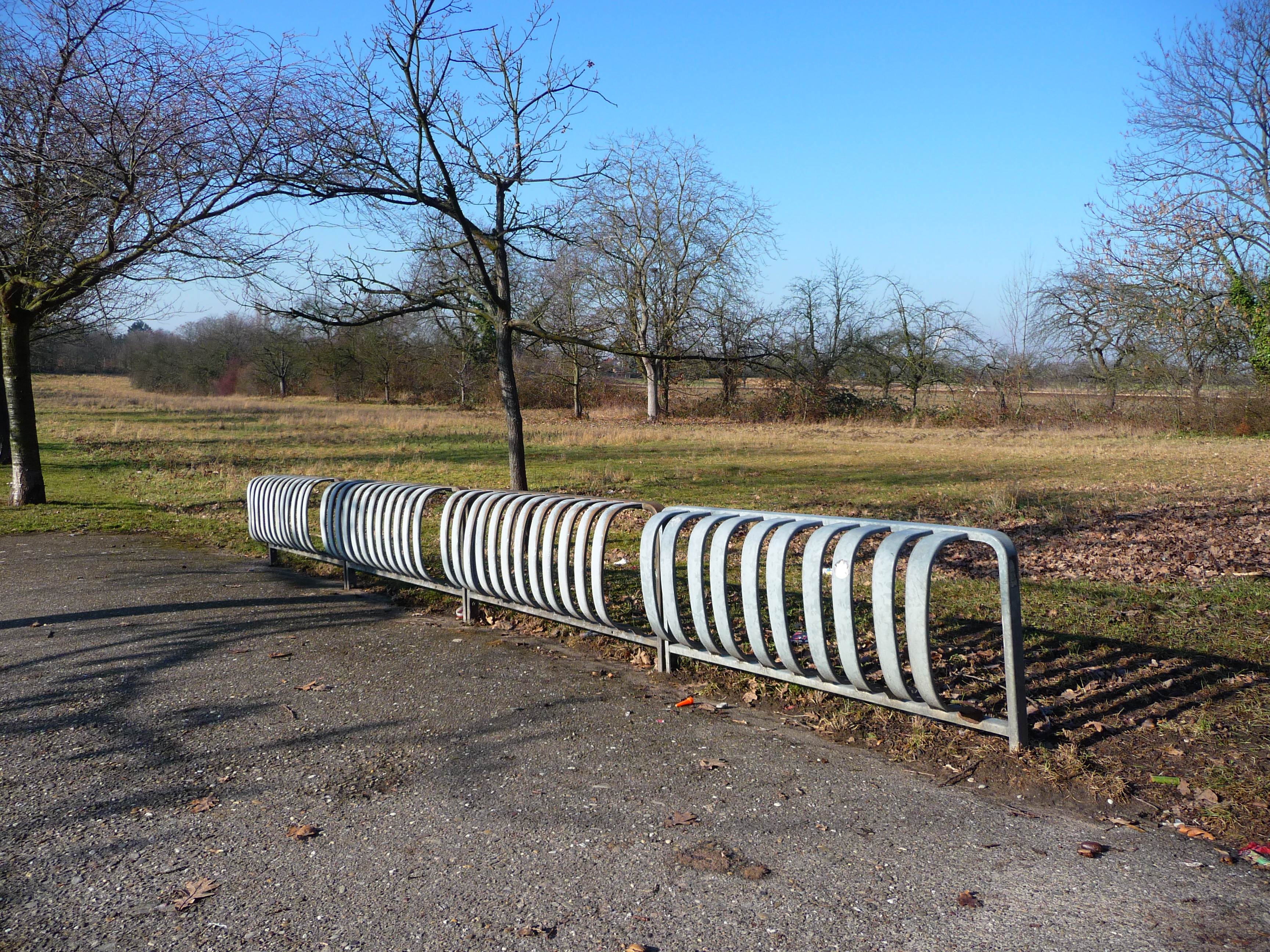 Fahrradabstellanlage am Feldrand in der Nähe eines Friedhofs